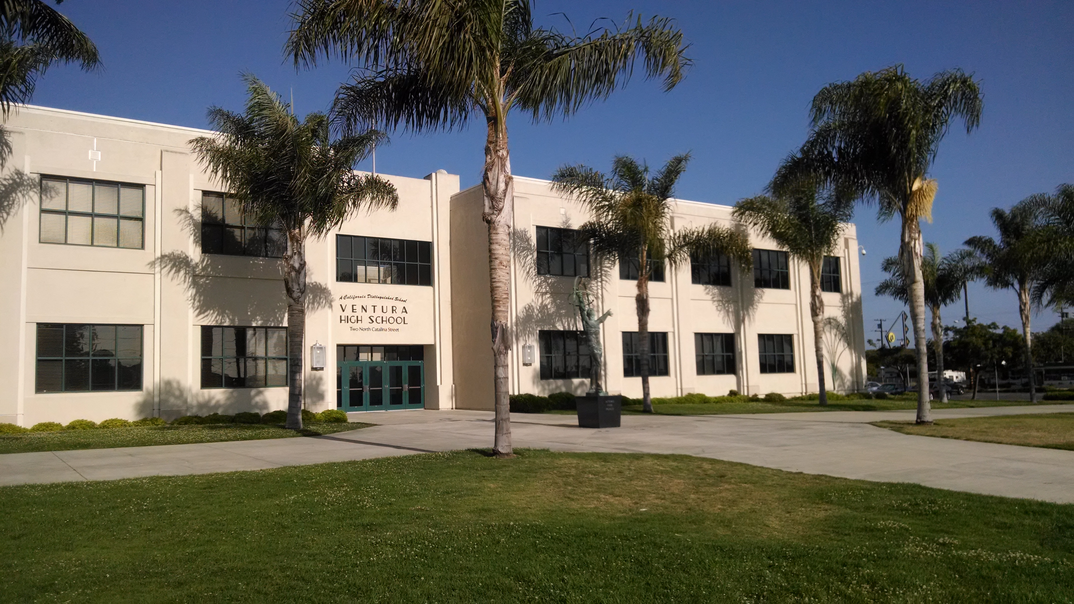 Facing Catalina